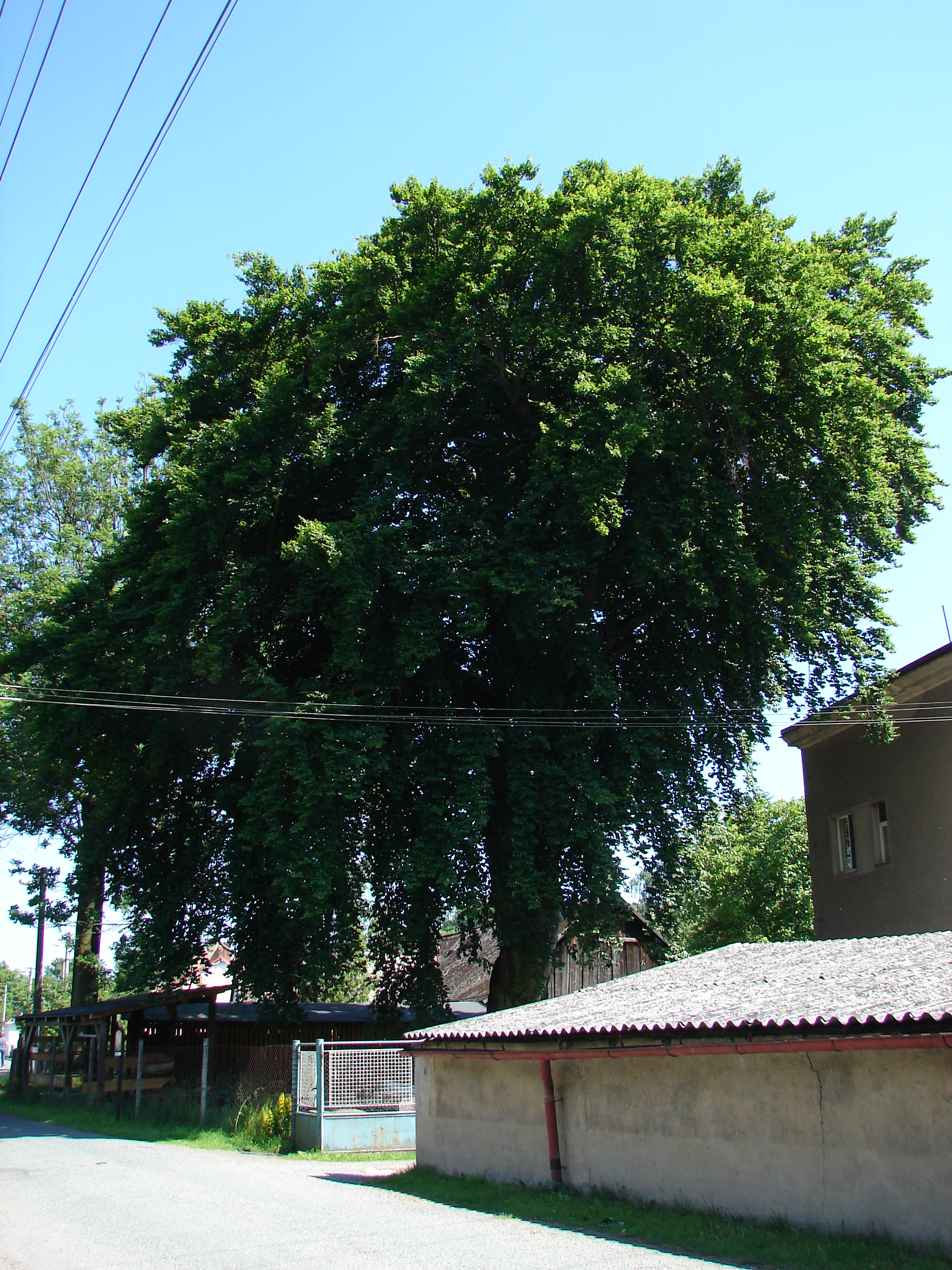 Památný strom Buk za dráhou v okrese Rychnov nad Kněžnou, Česká republika. Buk lesní "převislý" (Fagus sylvatica "pendula")